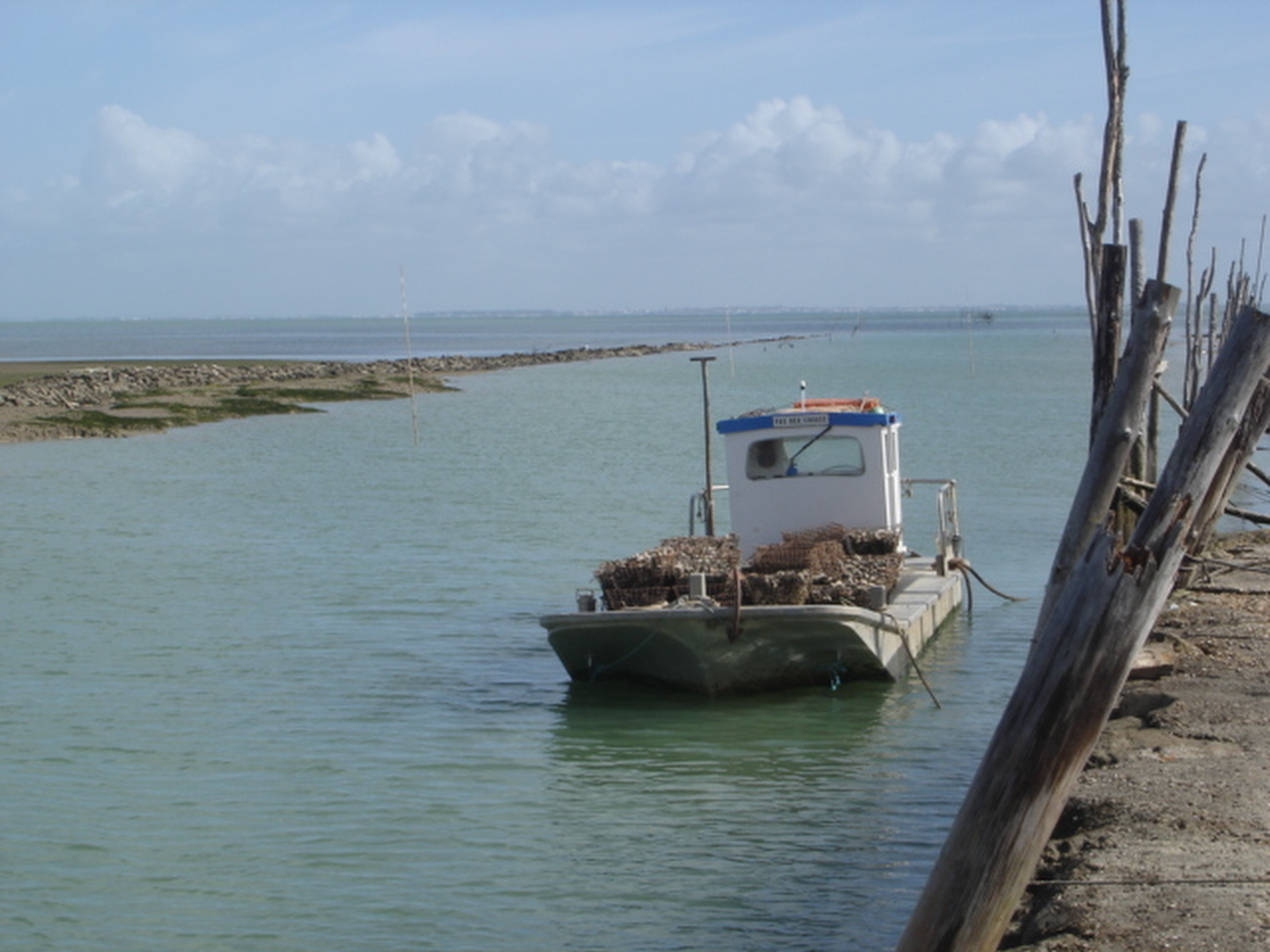 Bateau d'ostreiculteur à fond plat appelé les "Plates". Auteur : Jean-Claude Perez